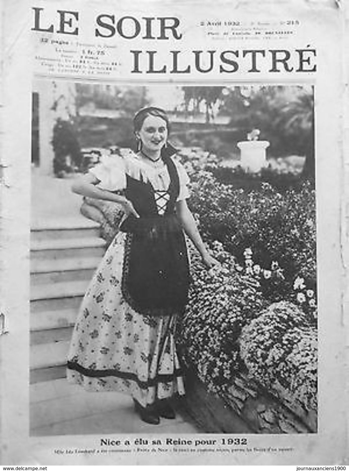 Le Soir illustré, reine de Nice, 1932.